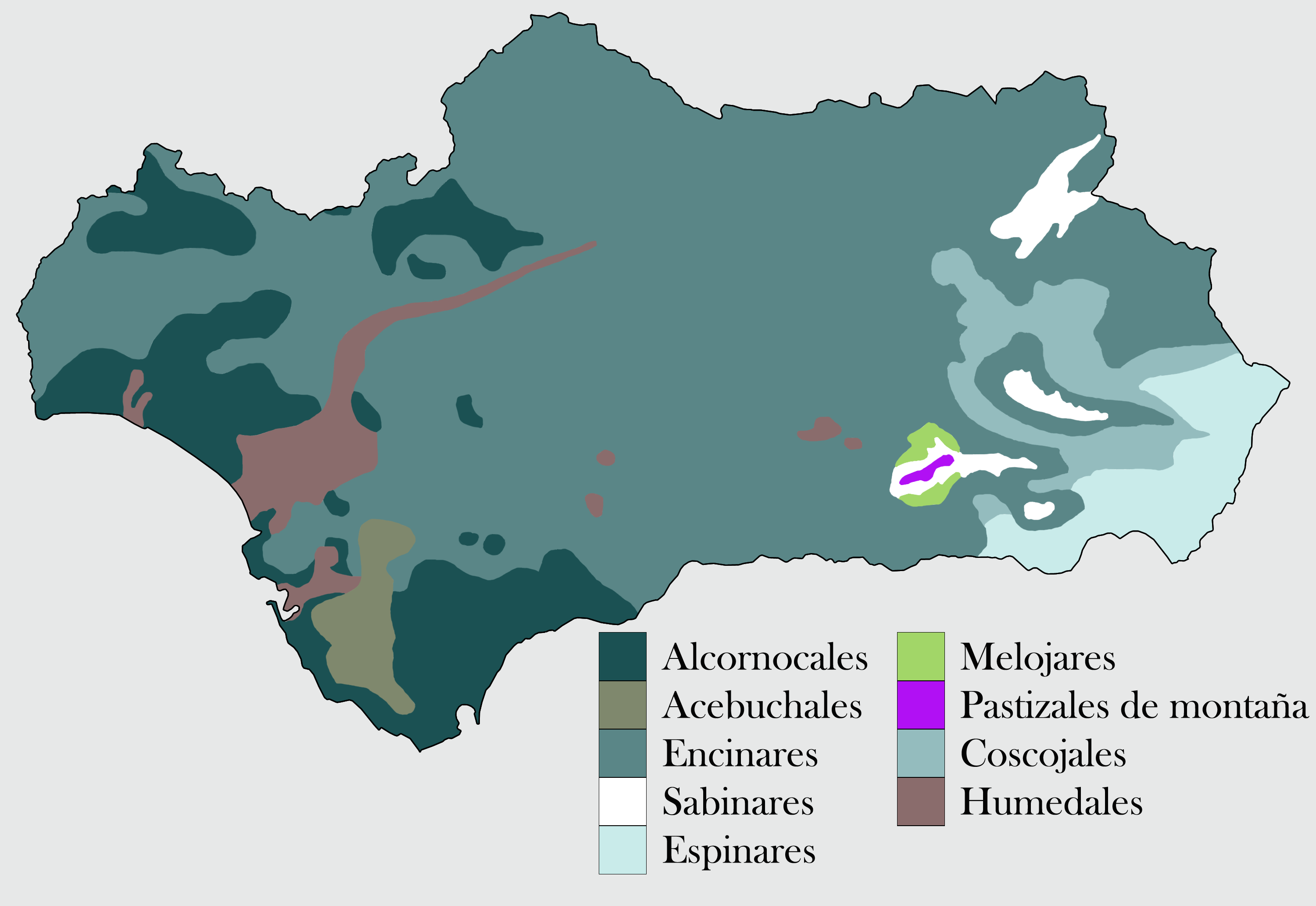 Mapa de la población potencial de Andalucía.